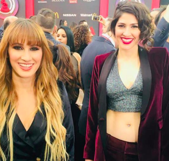 Ha*Ash Grammys